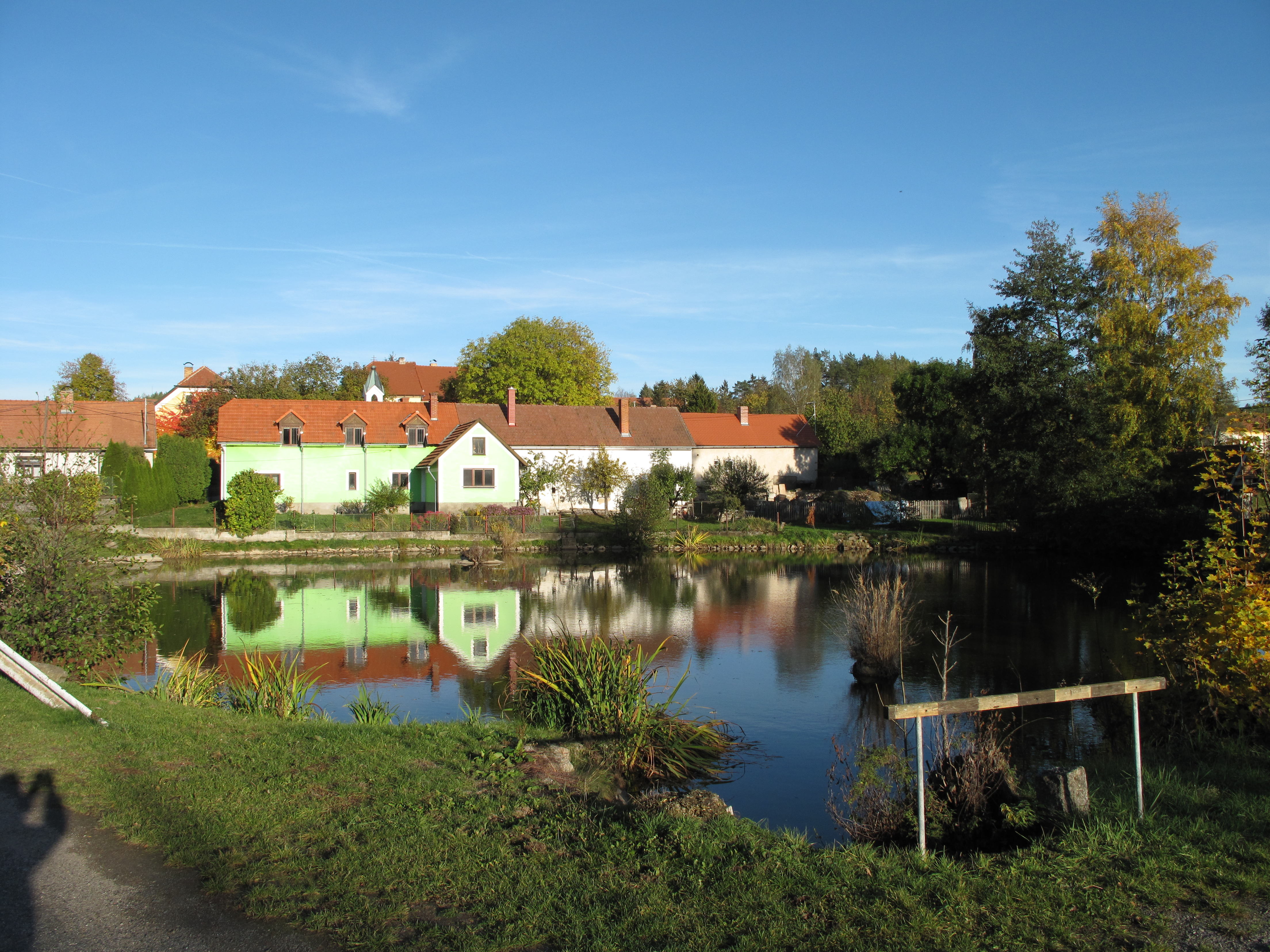 Rybník v Lovčicích. Okres Příbram, Česká republika.